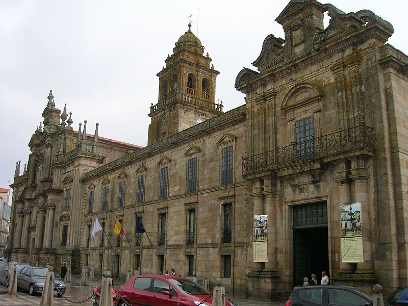 Fachada do mosteiro de San Salvador de Celanova